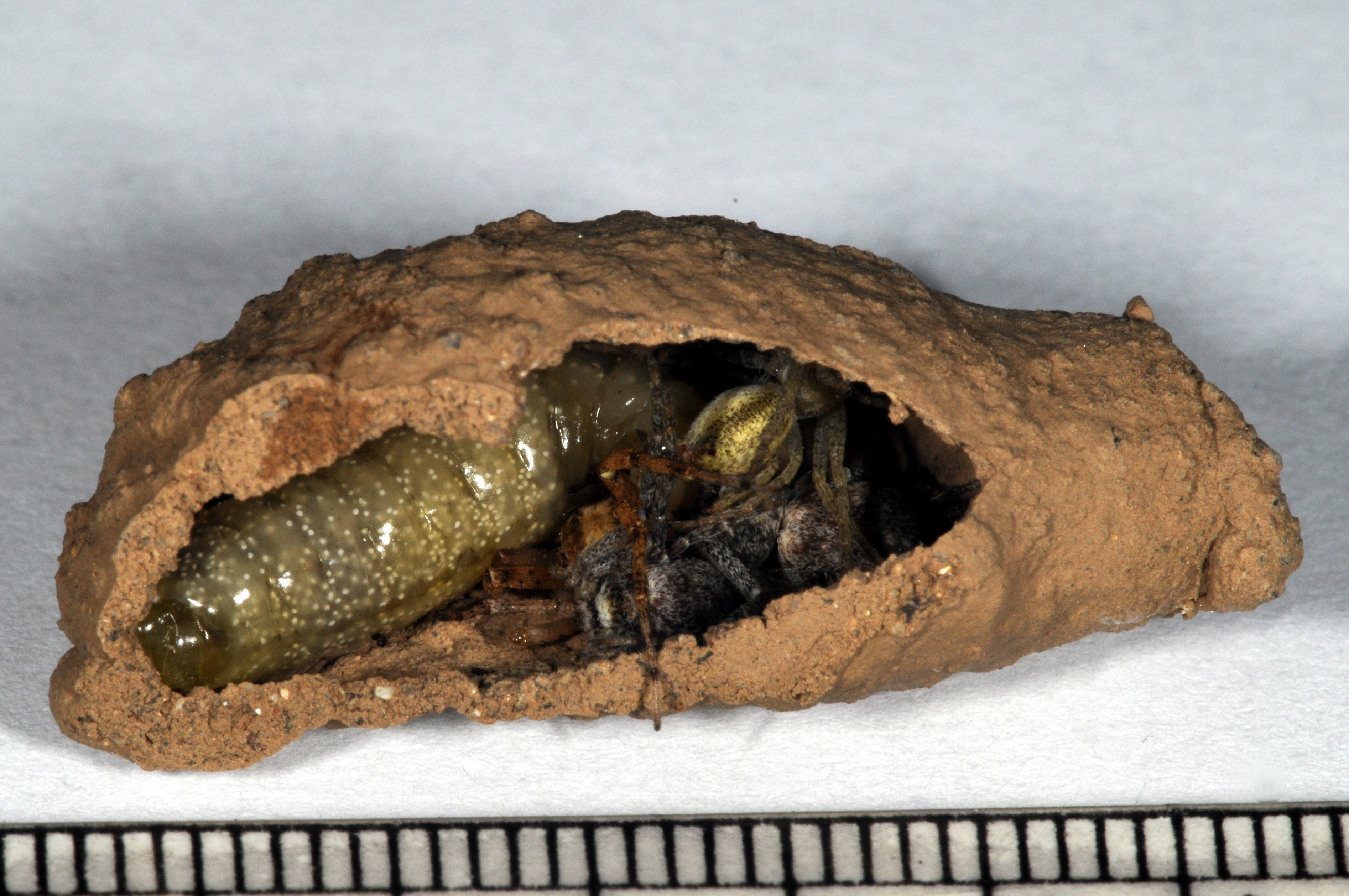 Sceliphron curvatum, Wiesbaden, Hessen, Deutschland